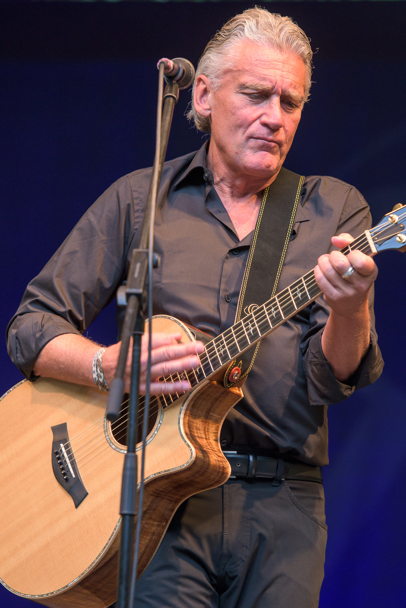 Concertbüro Franken,Konzert,Livekonzert,Livemusik,Musik,Rainhard Fendrich,Serenadenhof